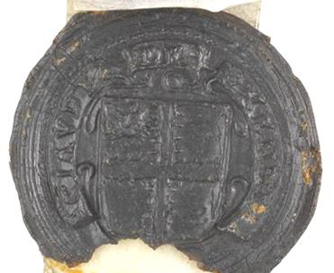 Sceau de Claude de Hennin seigneur de Warlaing et de Querenaing (Lille, Palais des Beaux-Arts)